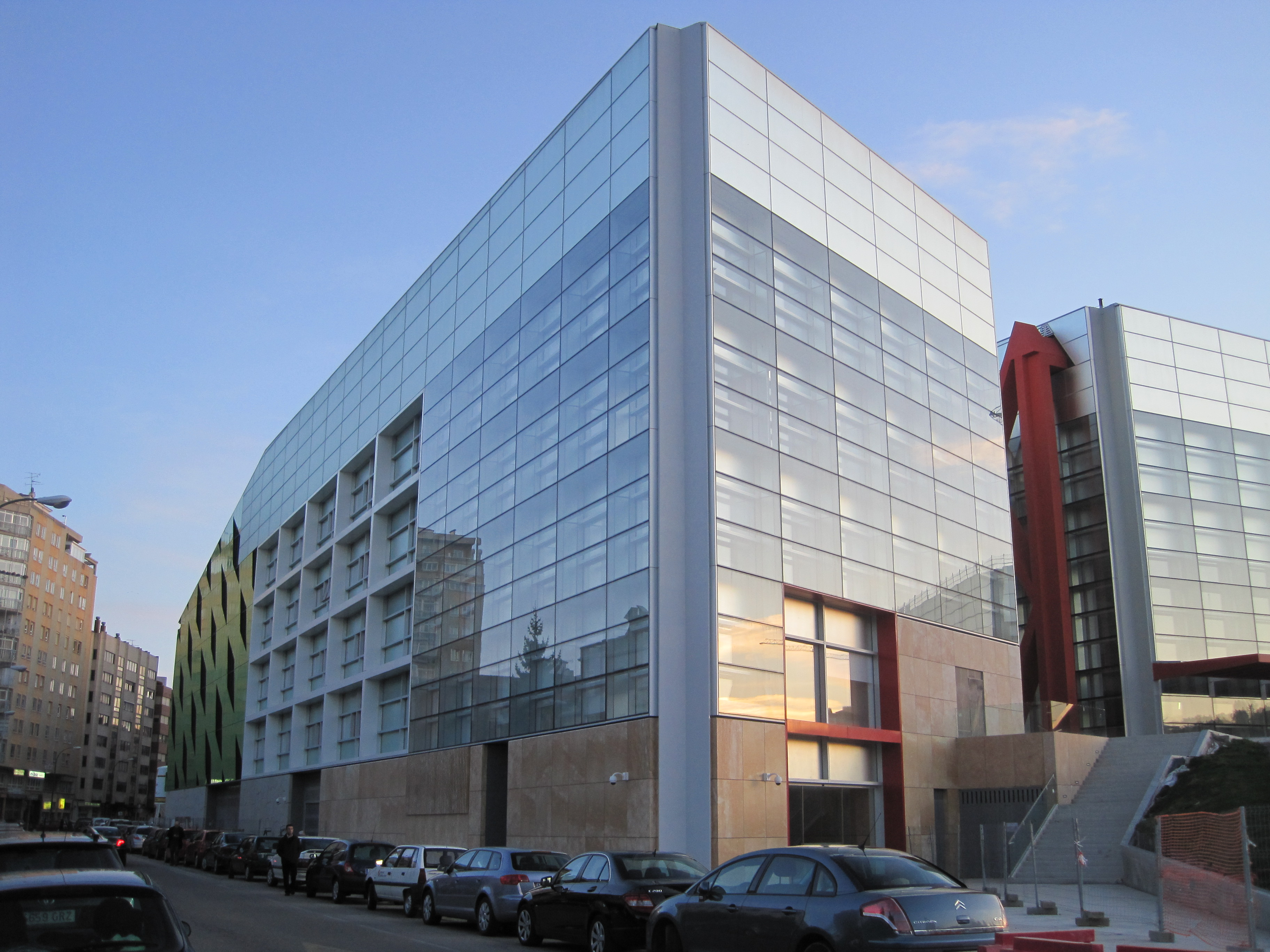 Vista del CENIEH desde el paseo de Atapuerca.